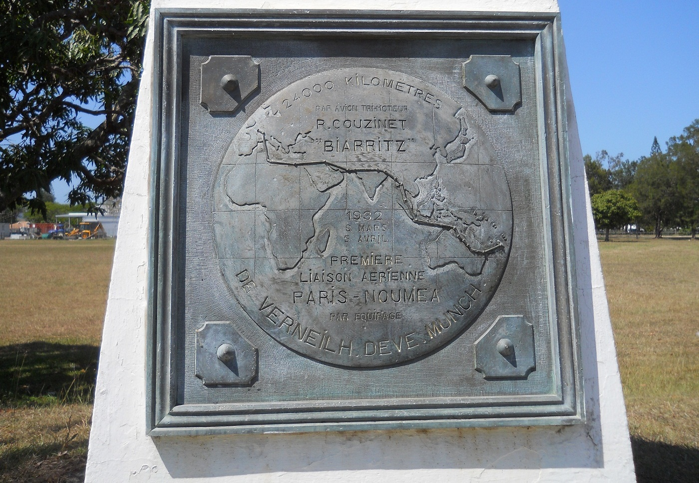 Biarritz plaque 1937 monument